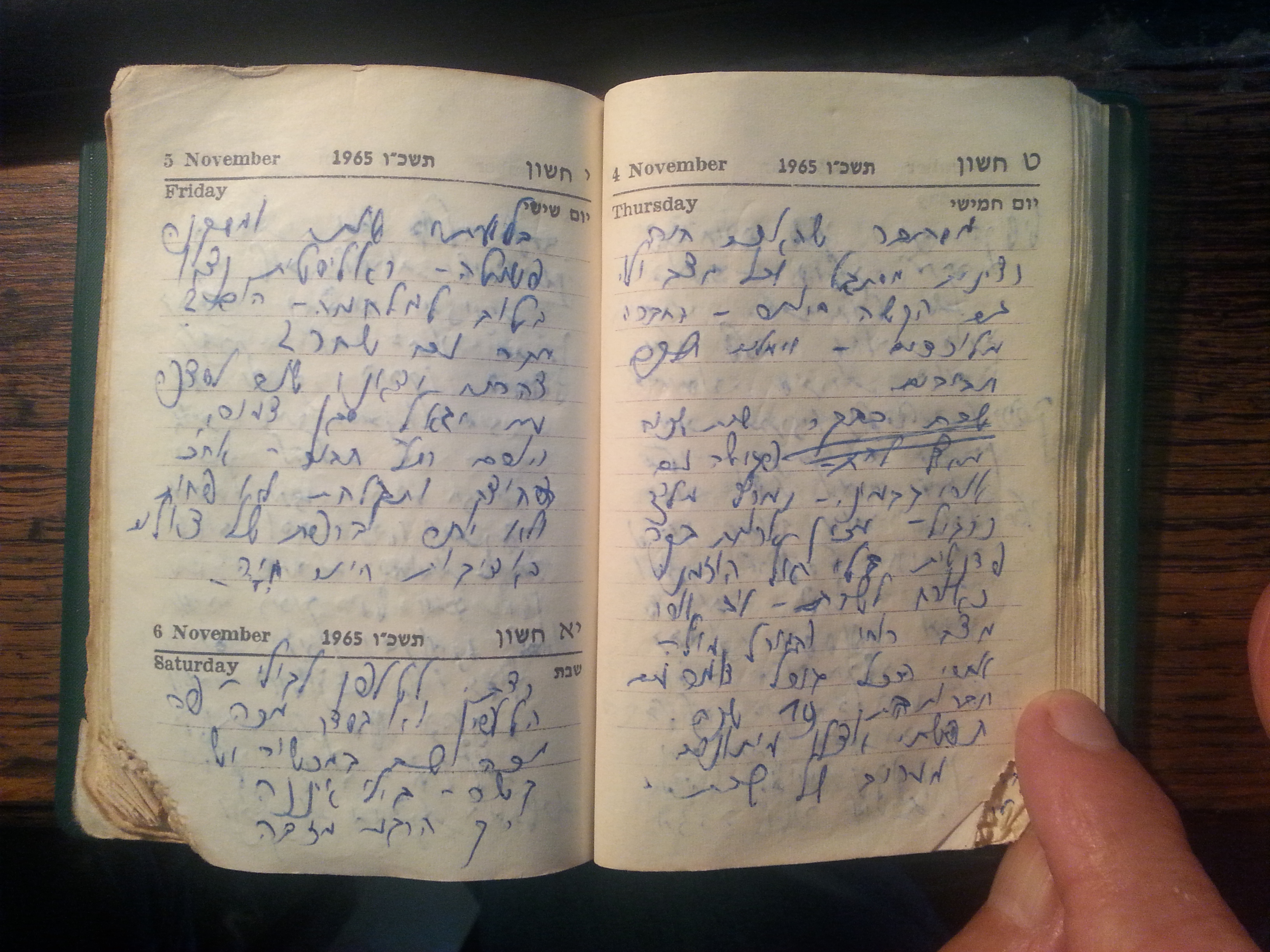 דפים מתוך יומנו של יהושע בר דיין המתאר את ימי הקרב במלחמת ששת הימים.